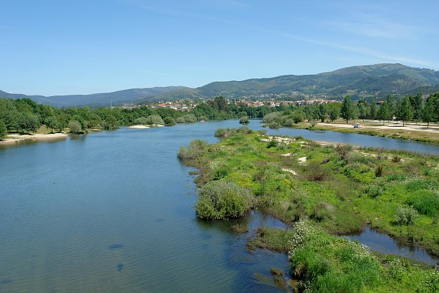 Lima River, Rio Lima, Portugal.